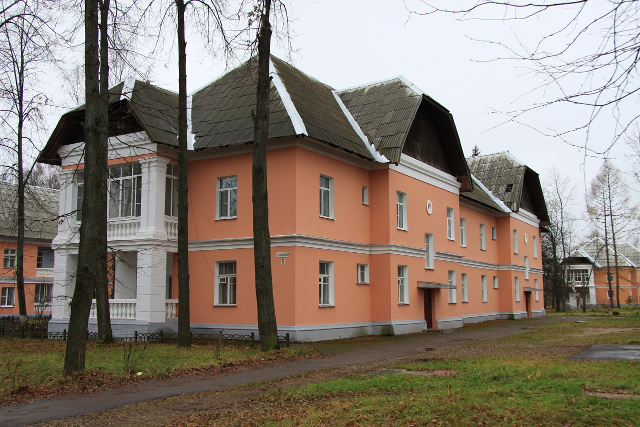 Архитектура в поселке ГЭС